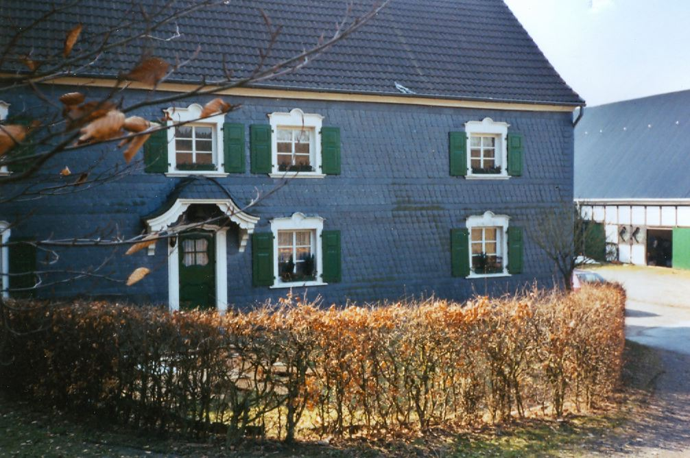 Das Altenberger Gut Steinhausen